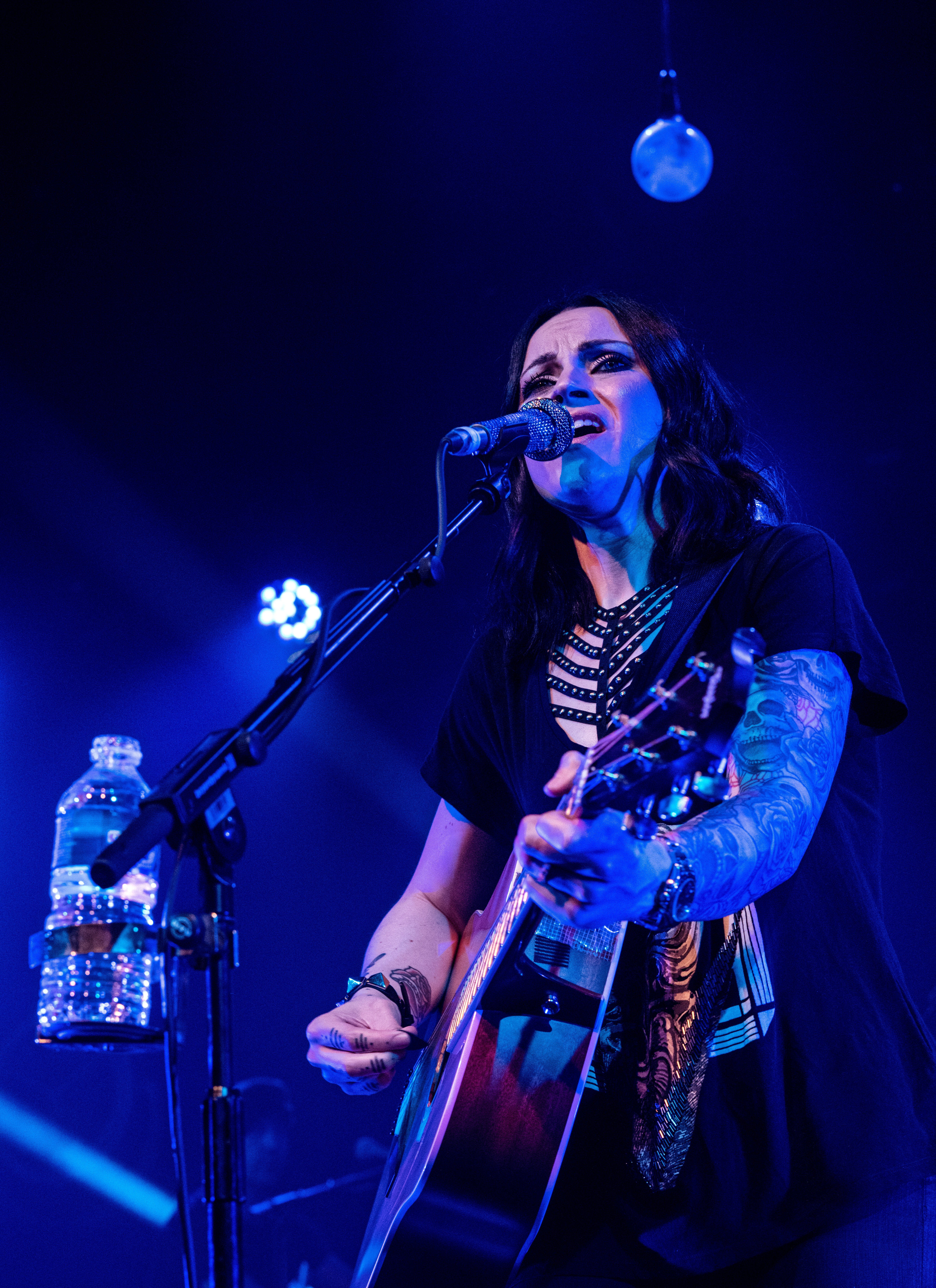 Bilder vom Zelt Musik Festival 2017 in Freiburg im Breisgau